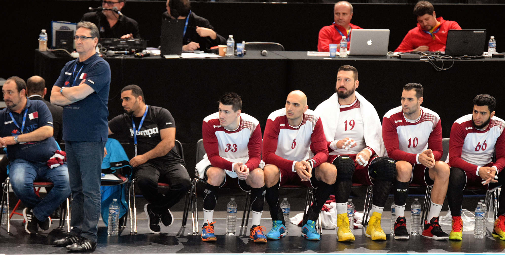 Le 10 janvier 2016 lors du match Norvège / Qatar durant la Golden League à l'AccordHotel Arena (Paris). Valero Rivera (père) et le banc Qatari